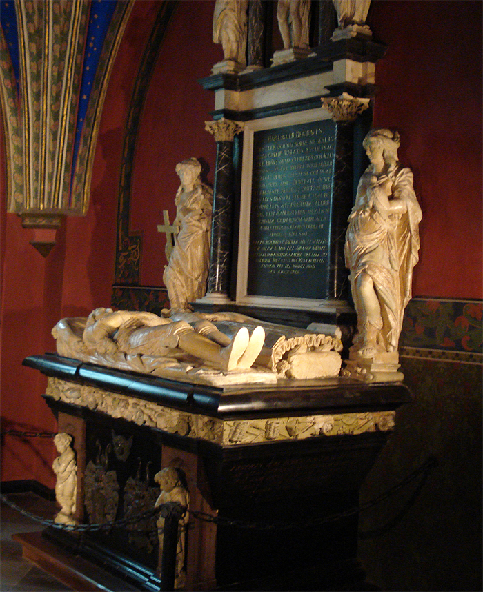 Torsten Stålhandskes gravmonument i Åbo domkyrka